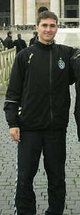 Маркос Пиццелли